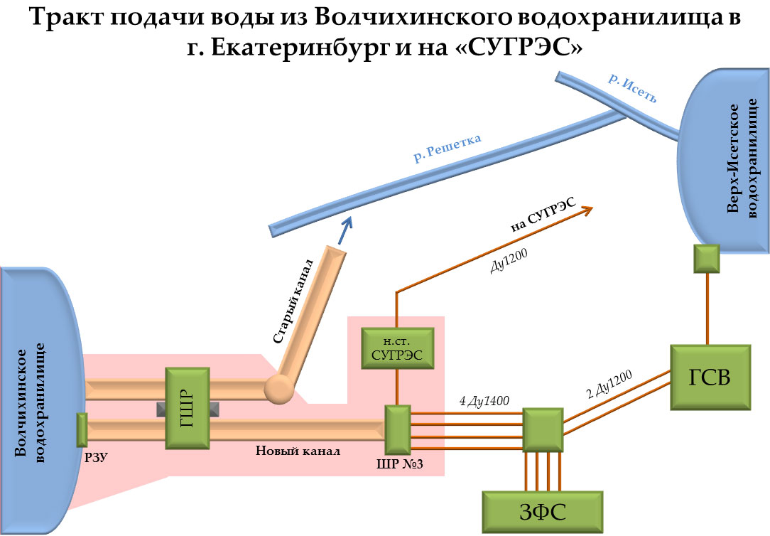 Тракт подачи воды в г. Екатеринбург